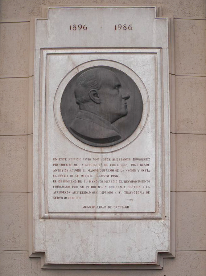 Placa recordatoria de la casa de Jorge Alessandri Rodriguez